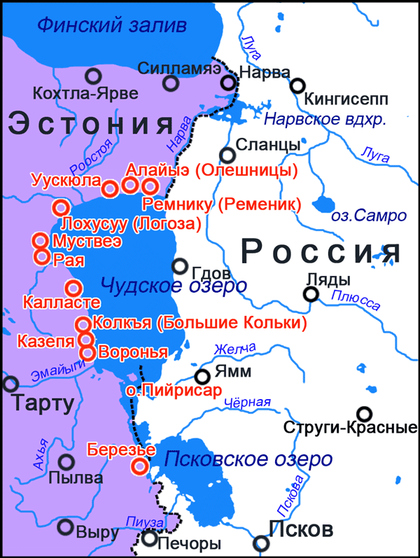 Карта населённых пунктов Эстонии, где проживали до сер. XX века (и часть из них до наст. времени) русские старообрядцы. На основе данных: Кюльмоя И. П., Ровнова О. Г. О современном состоянии русских старообрядческих говоров Западного Причудья, 2007 Ровнова О. Г. Говоры староверов Западного Причудья Ровнова О. Г. О современном языке староверов Западного Причудья. Очерки по истории и культуре староверов Эстонии. Тарту, 2004 Estonian ministry of foreign affairs. Russian Old Believers in Estonia Официальный сайт русских староверов Эстонии